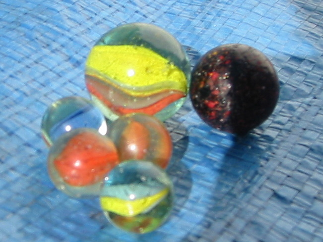 Billes et calots